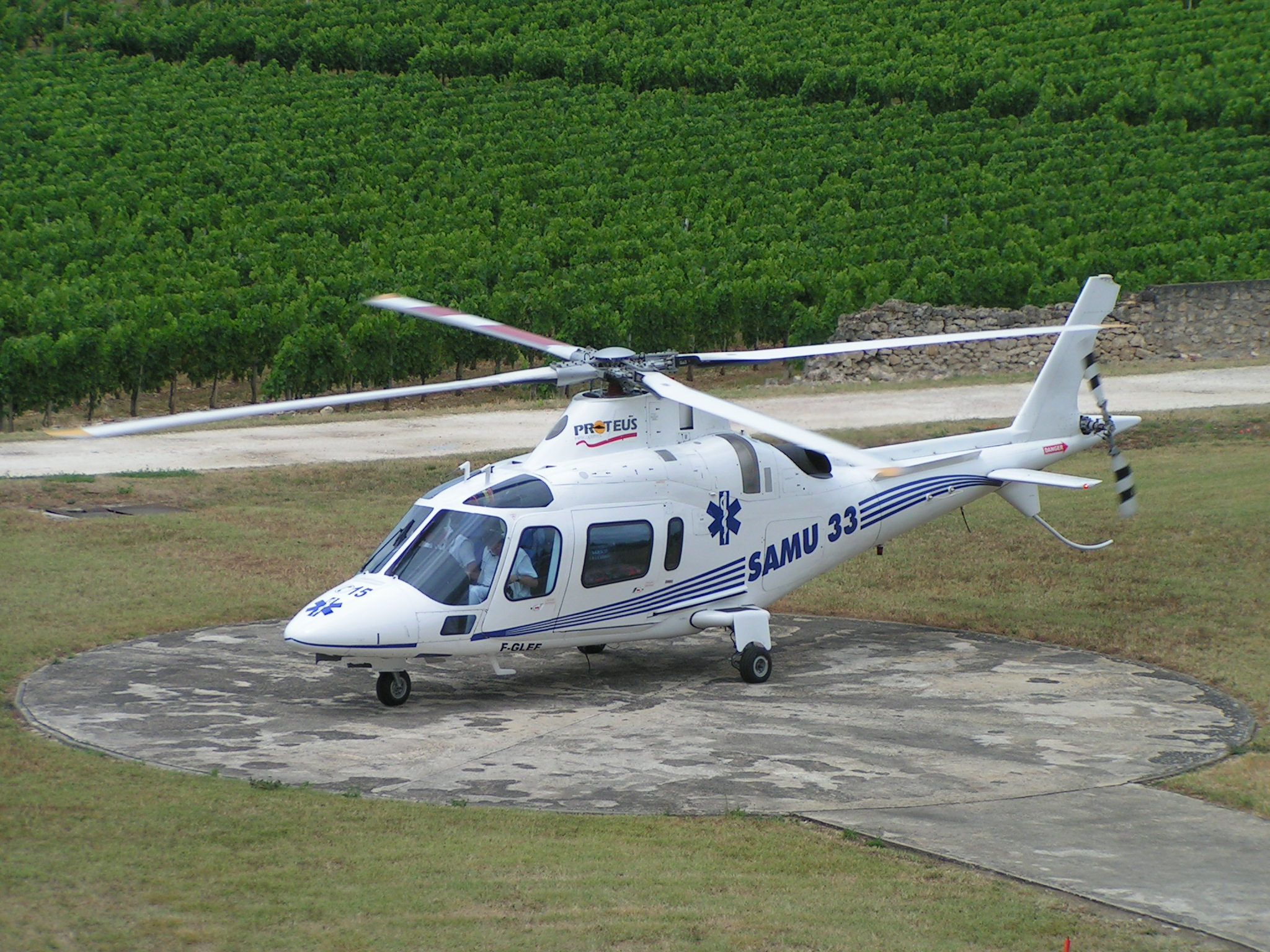 Agusta 109 version sanitaire. Cet aéronef (F-GLEF) était affecté au SAMU 33 (Gironde) comme indiqué sur le logo Samu 33. Il a été remplacé par un EC 145 et est désormais (en 2010) affecté au SAMU d'Eure et Loir (SAMU 28). La miniature ci-dessous présente le F-GLEF dans sa nouvelle livrée.